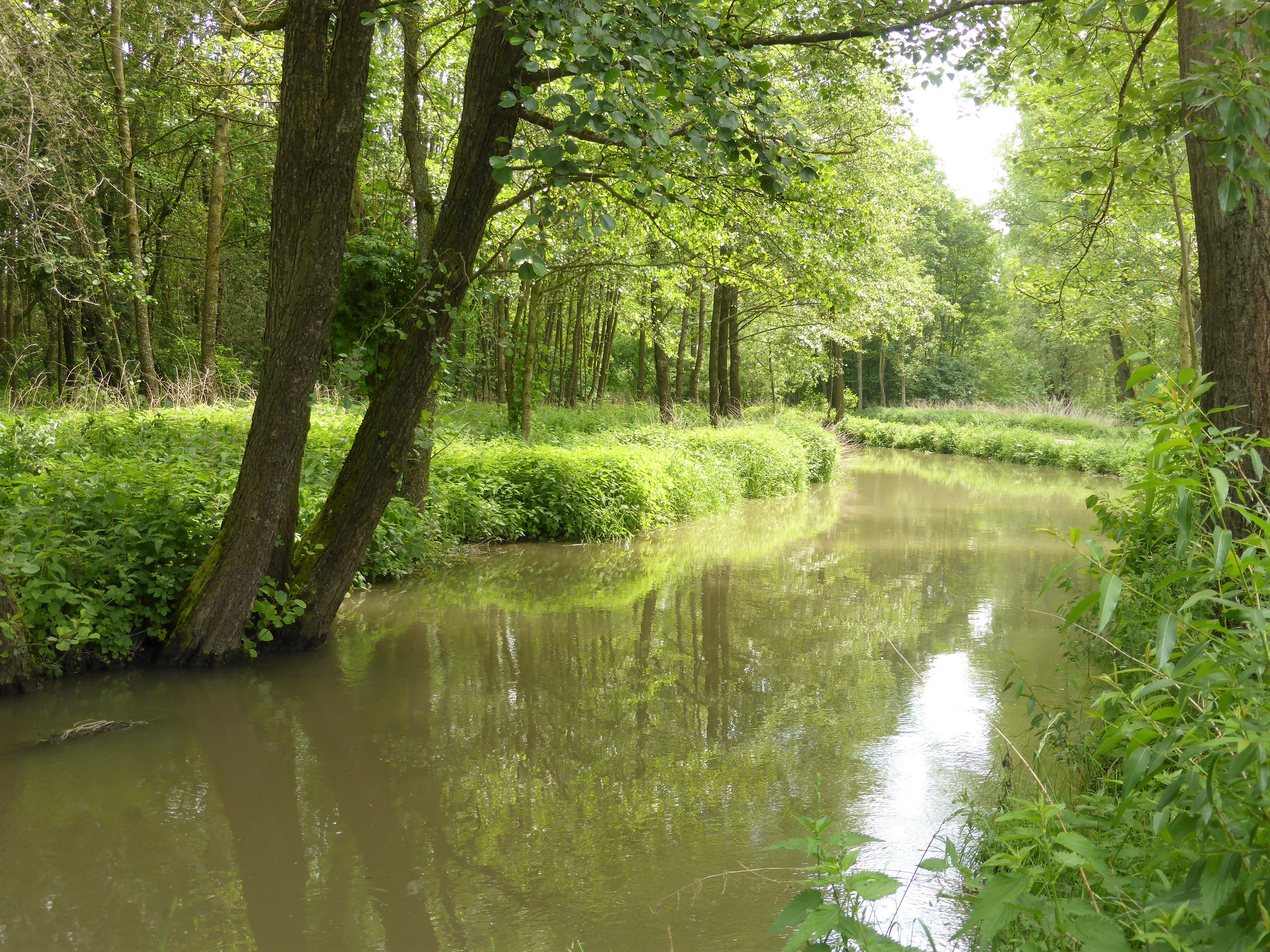 Die Kleine Laber im Landschaftsschutzgebiet "Hirschlinger Au" im Landkreis Straubing-Bogen.